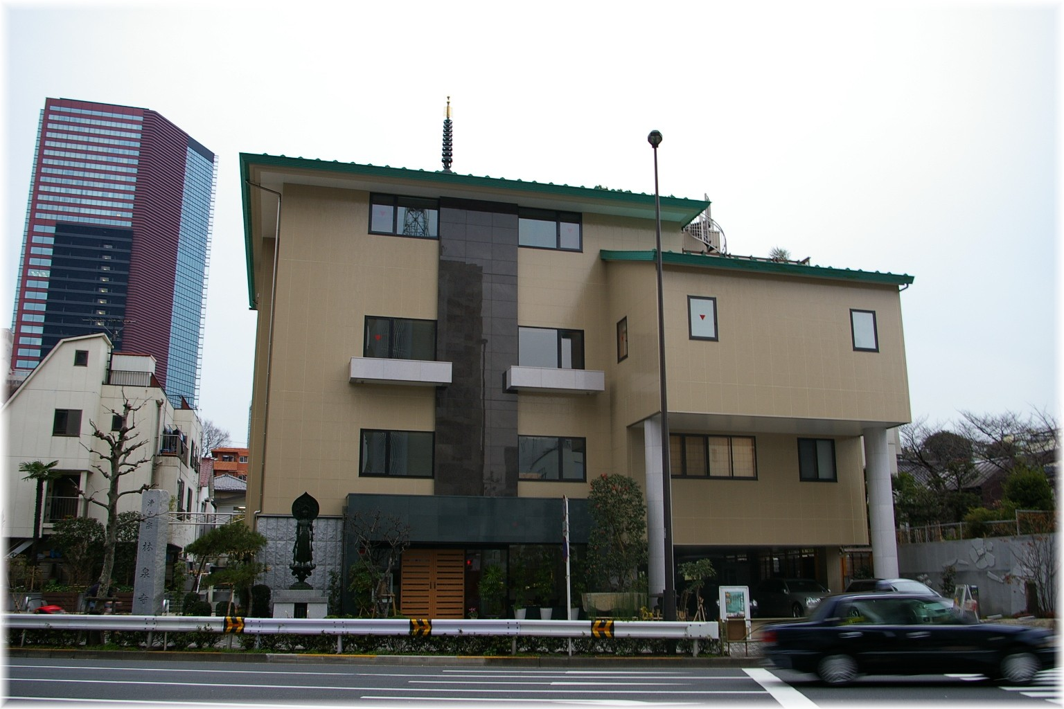 Ich machte dieses Foto von mir in 2006. 林泉寺